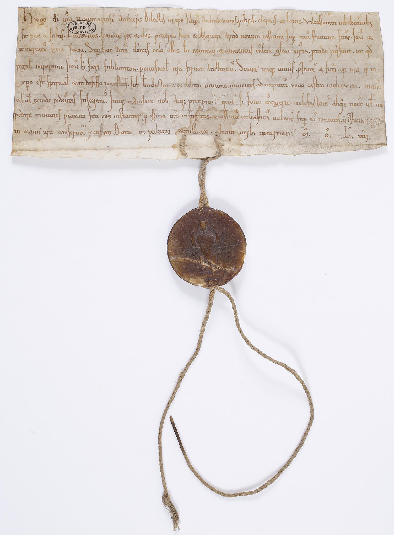 Hugues, archevêque de Rouen, prend sous sa sauvegarde ceux qui fréquenteront le marché établi par Louis VII à Château-sur-Epte (Eure). Saint-Denis, 1154.